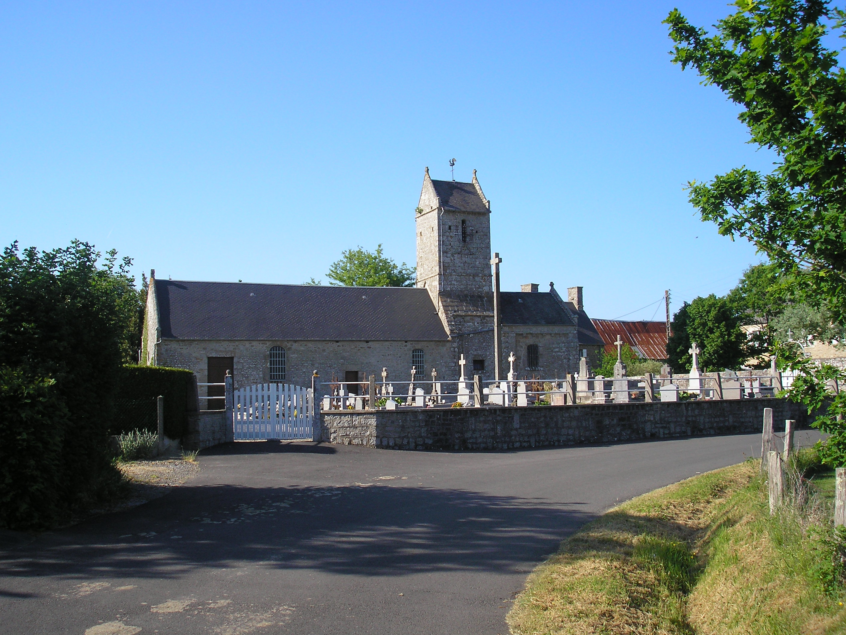 Angey (Normandie, France). L'église Saint-Samson.